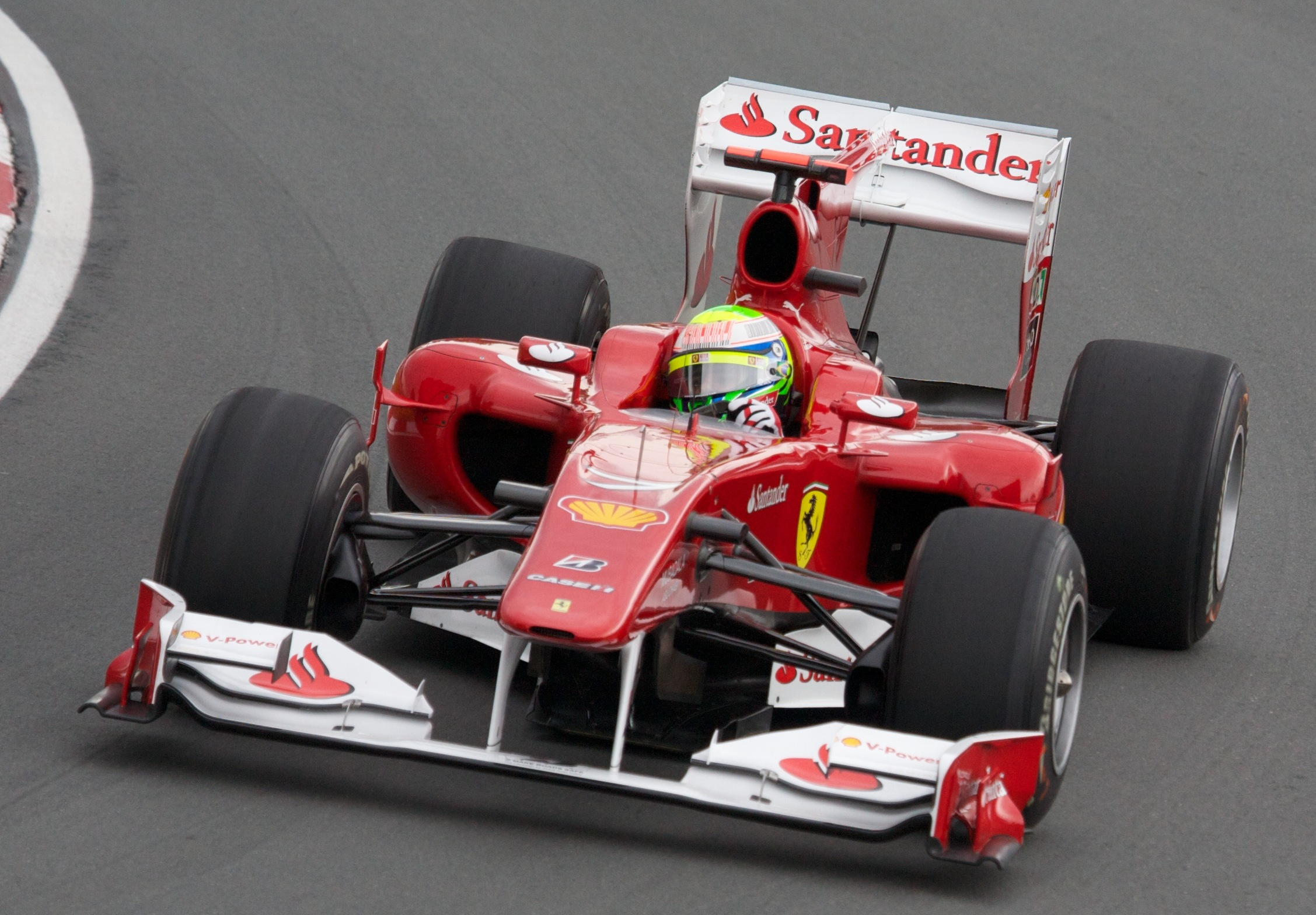 Massa exits turn 2